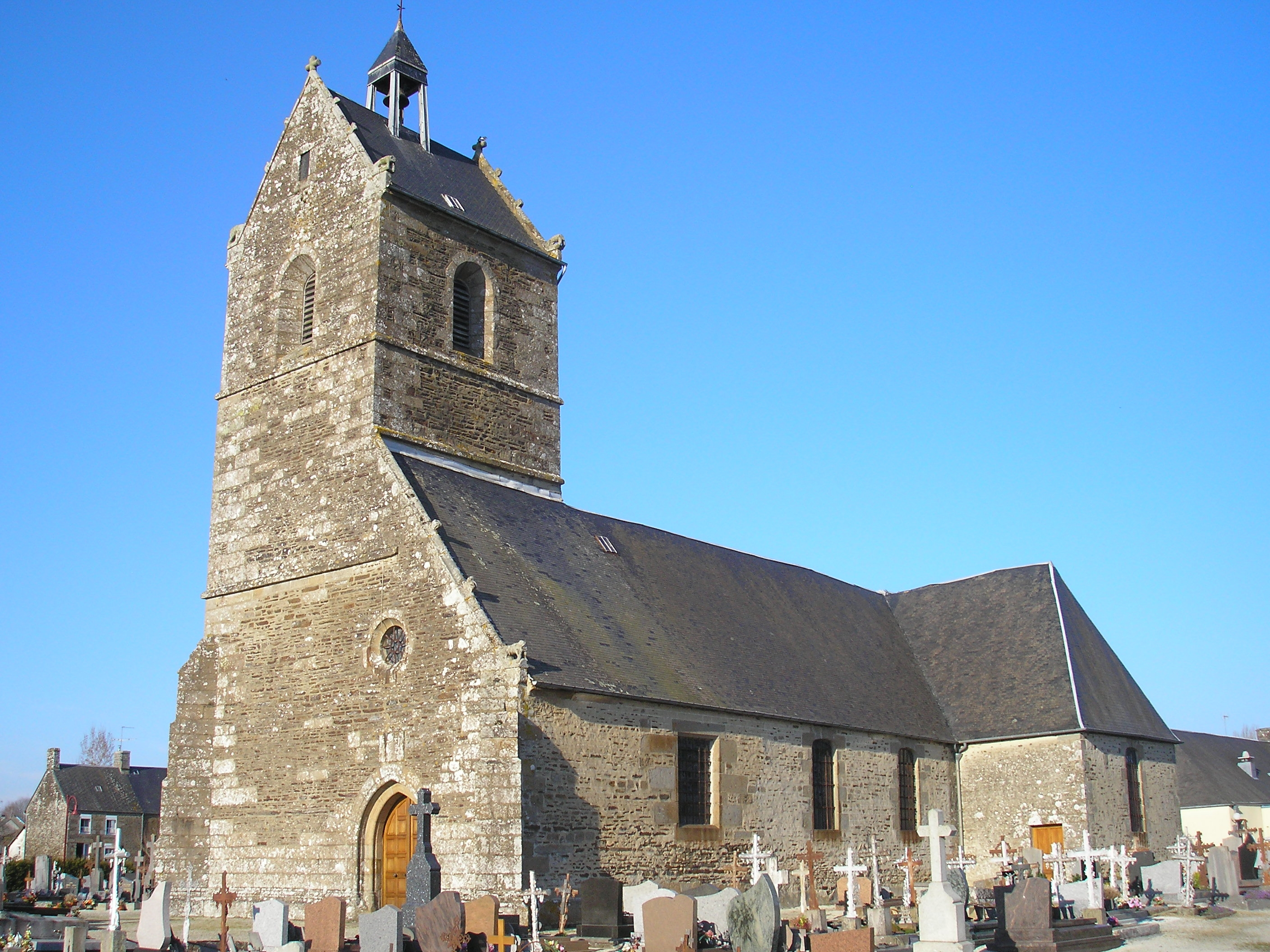 Virey (Normandie, France). L'église Saint-Gervais.